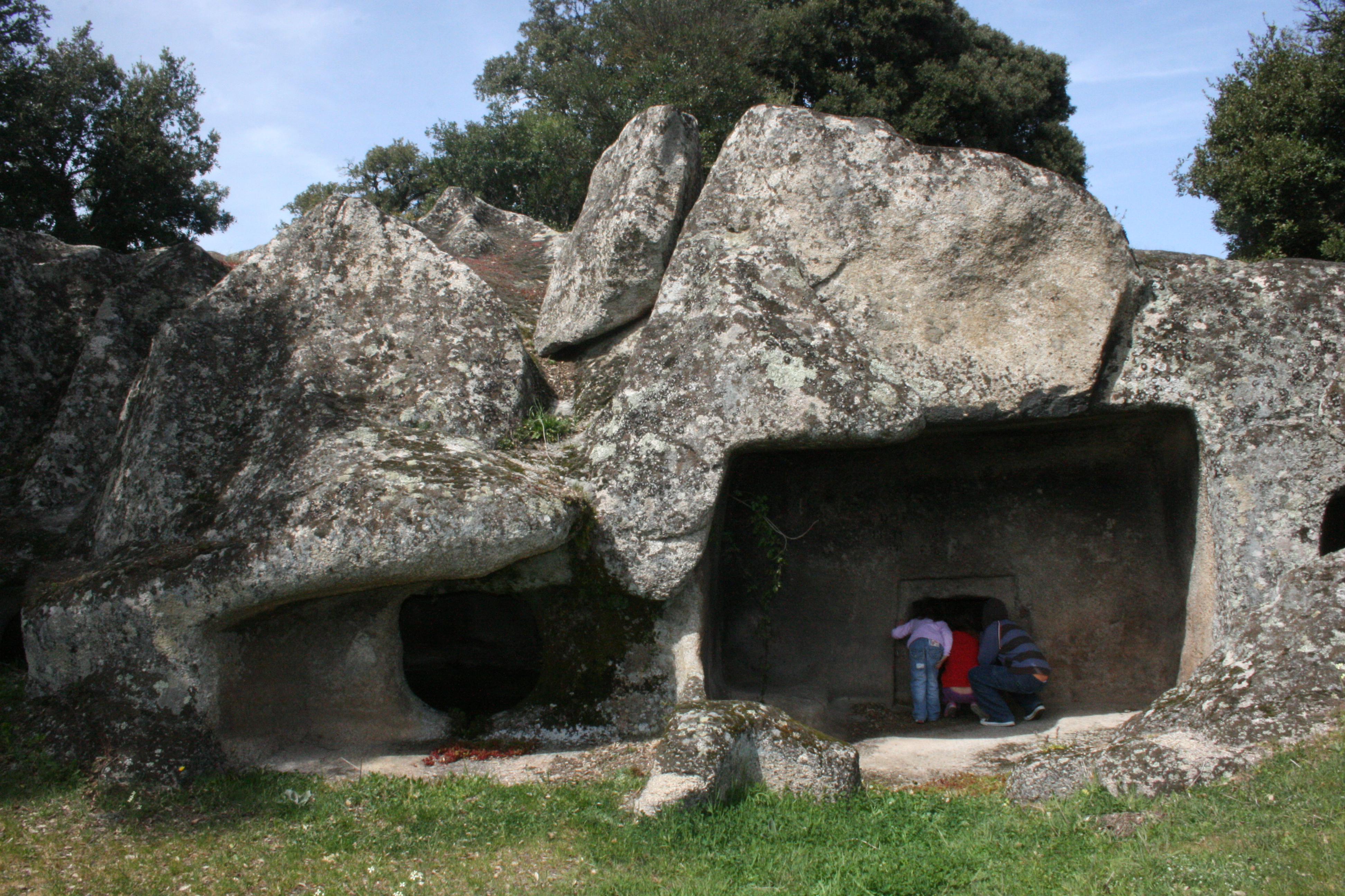 Le Domus de janas di Ludurru sono una piccola necropoli sita all'immediata periferia del paese